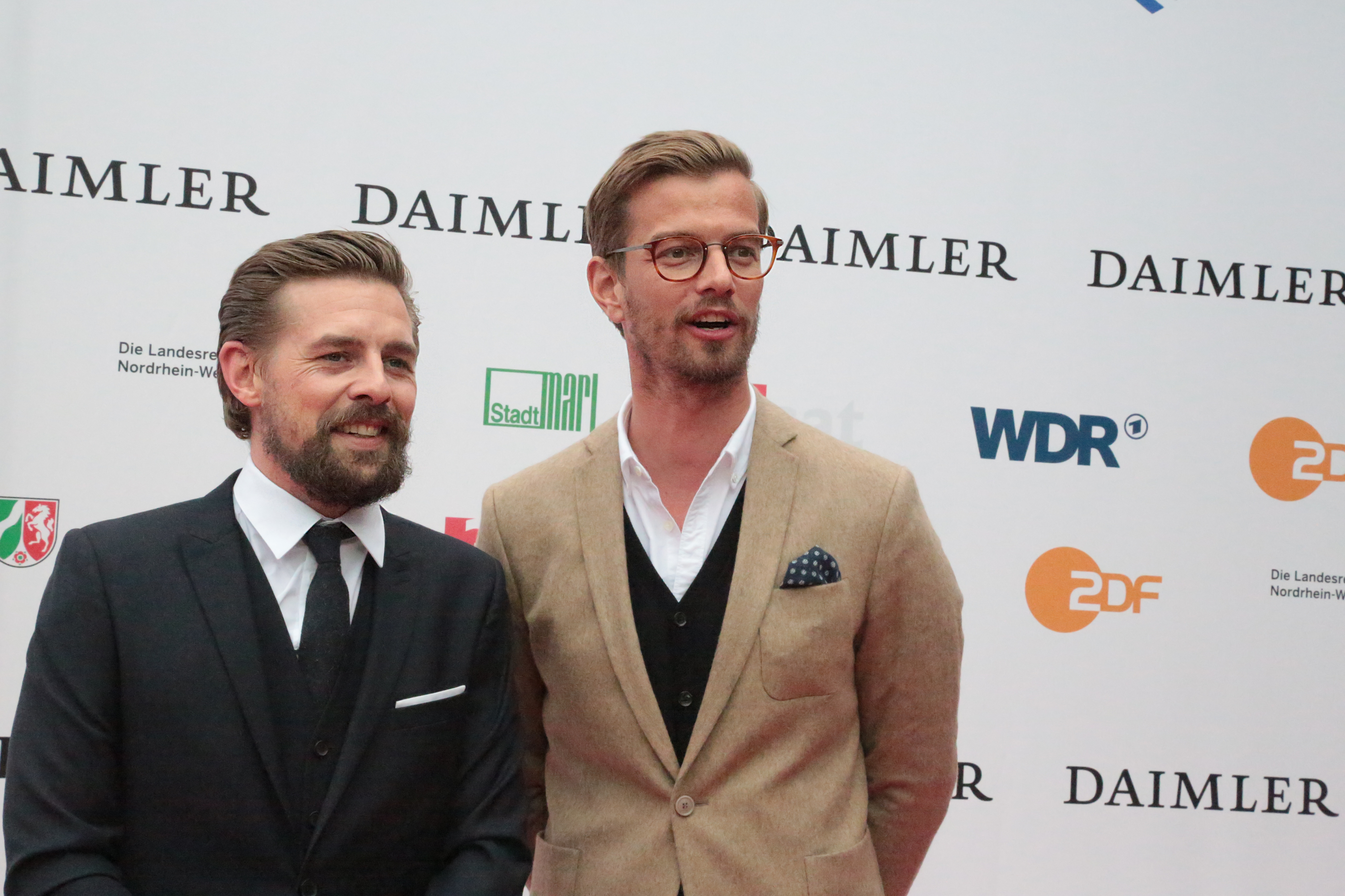 Klaas Heufer-Umlauf, Joko Winterscheidt beim Grimme-Preis 2018, am 13.04.2018 in Marl.